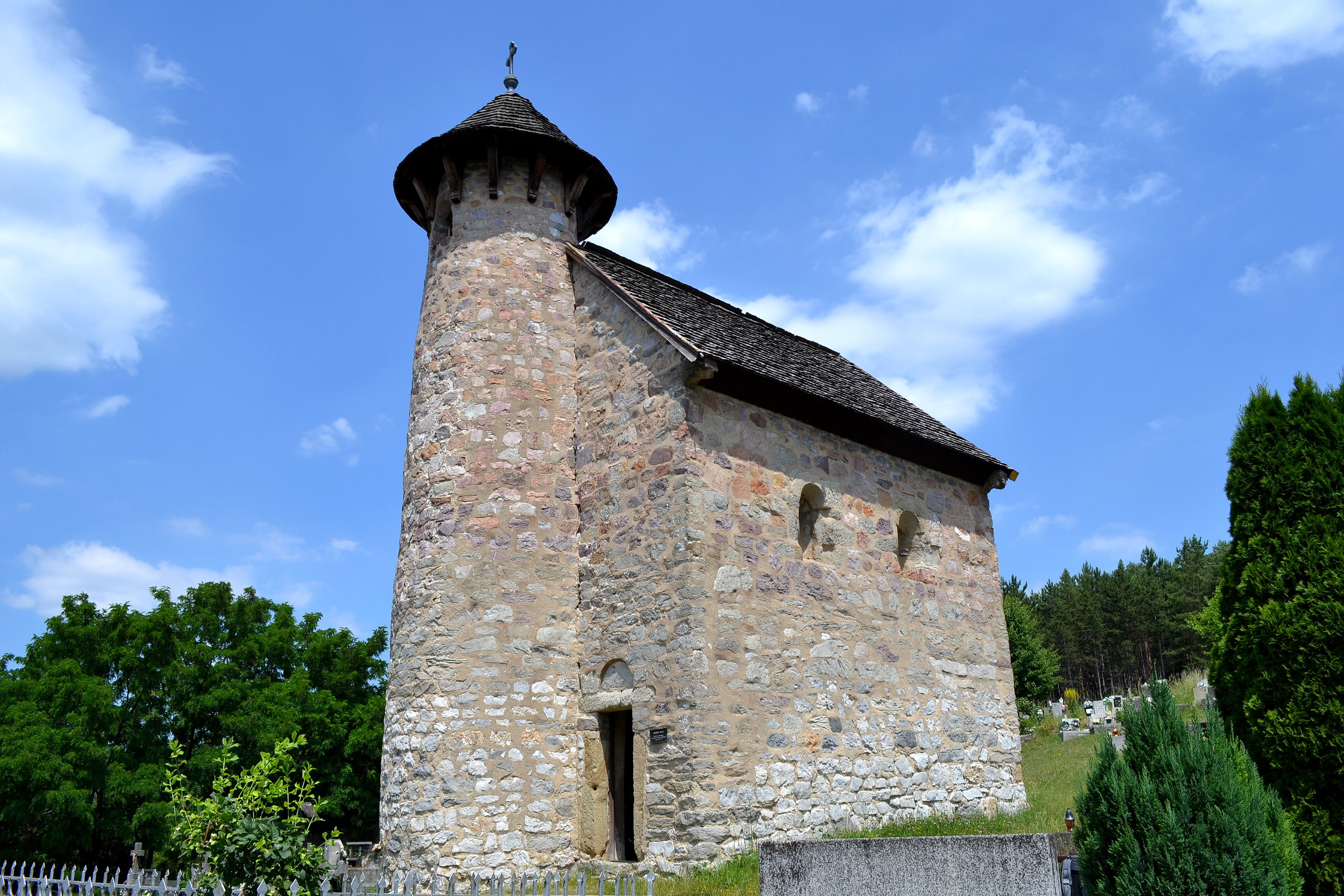 Veľký Klíž, Kostol svätého Michala archanjela v miestnej časti Klížske Hradište; celkový pohľad